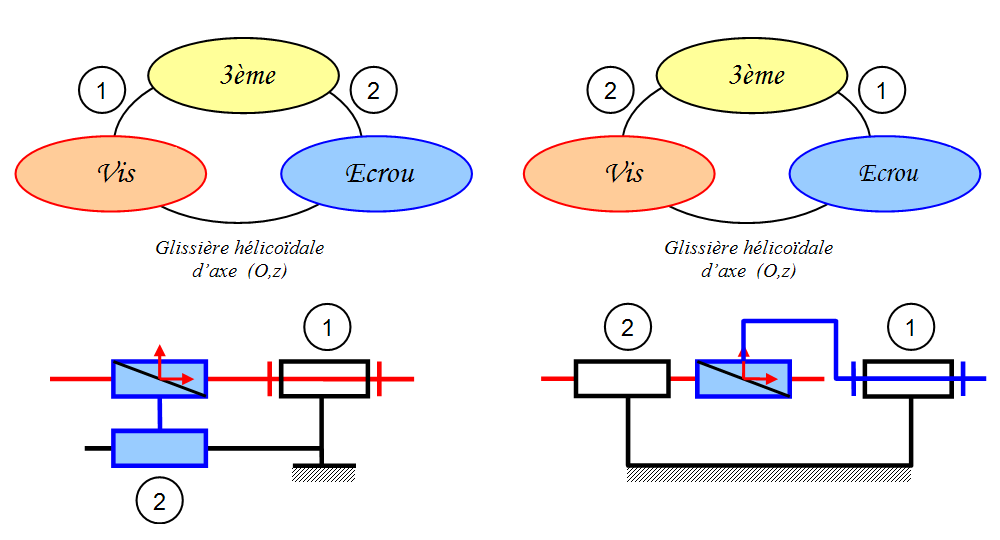 modélisation des systèmes vis/écrou